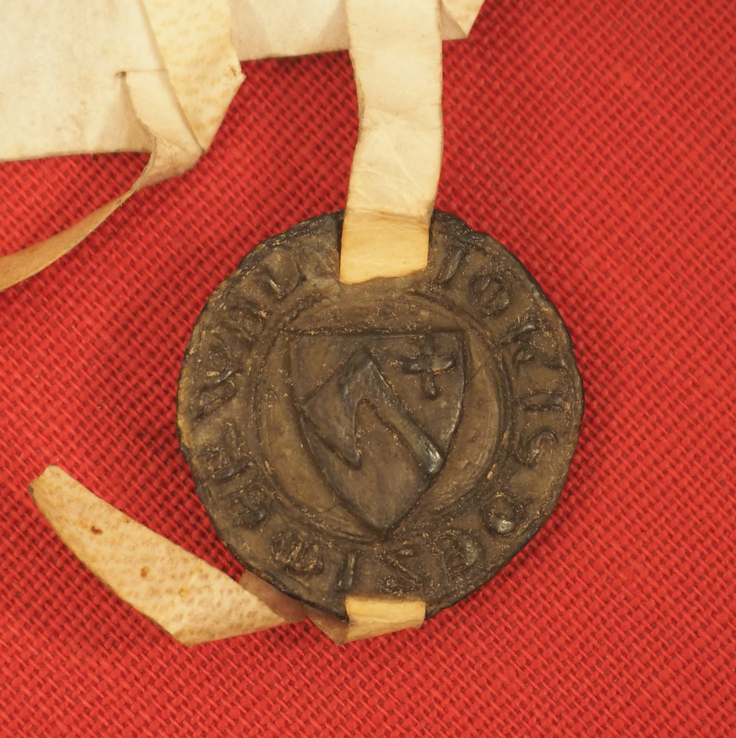 Siegel des Johannes von Zimmerwald, Legende: JO[...]S DE SIMERWALD, Staatsarchiv Bern, C I b (Urkunden), Fach Fraubrunnen, 1360-08-14